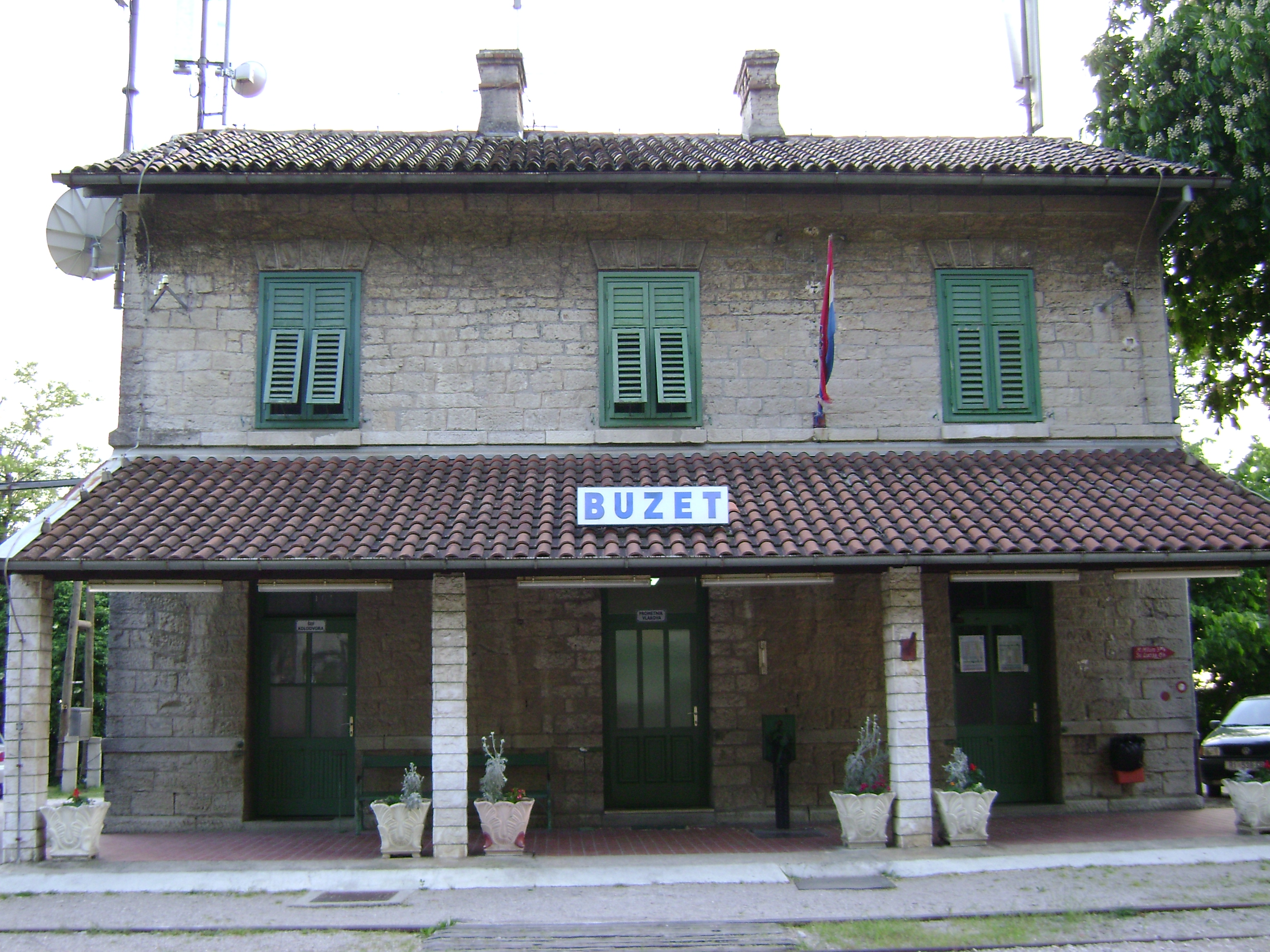 Zgrada kolodvora u Buzetu na pruzi "Divača - Pula"